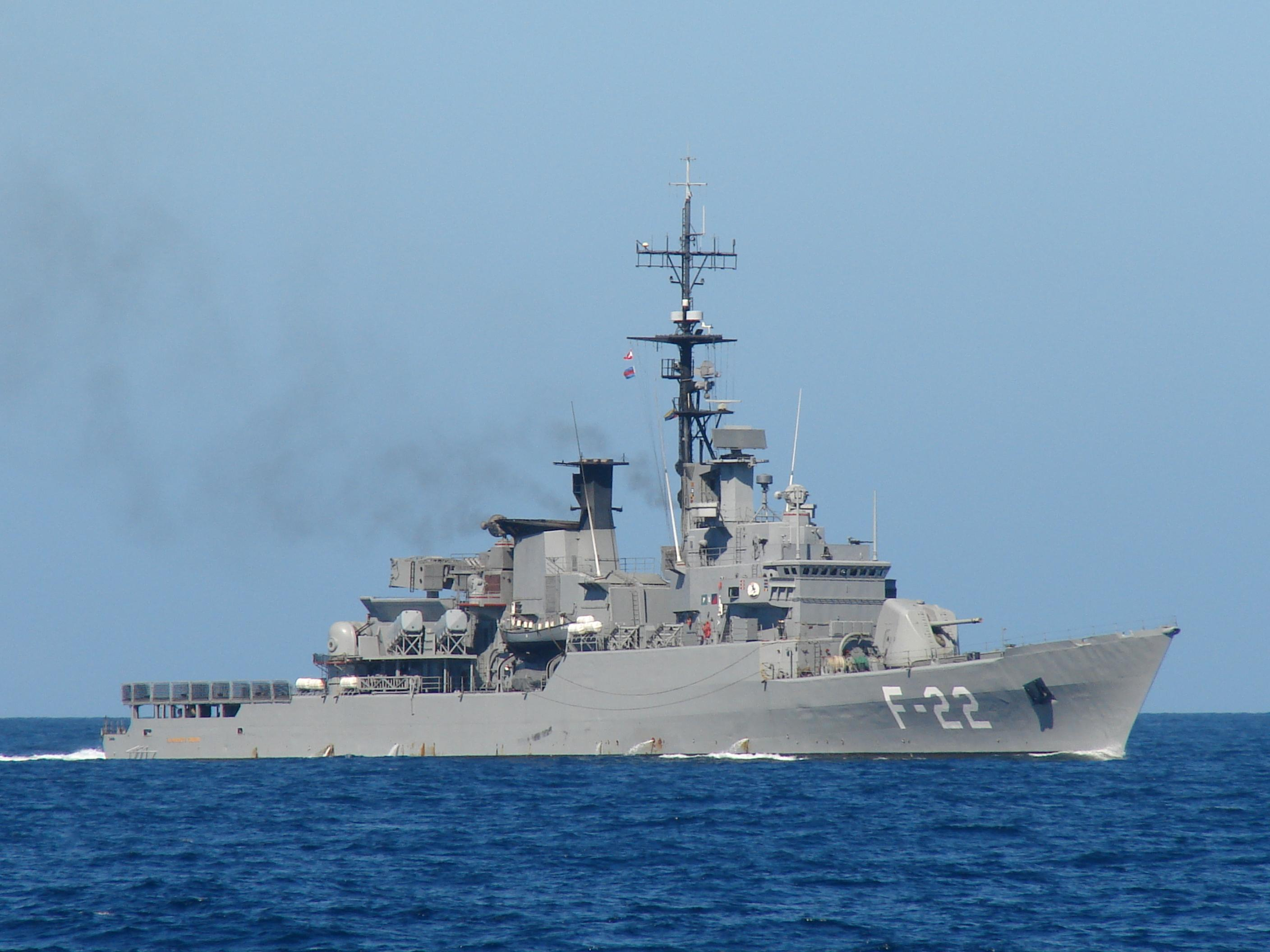 ARV Almirante Brión (F-22).